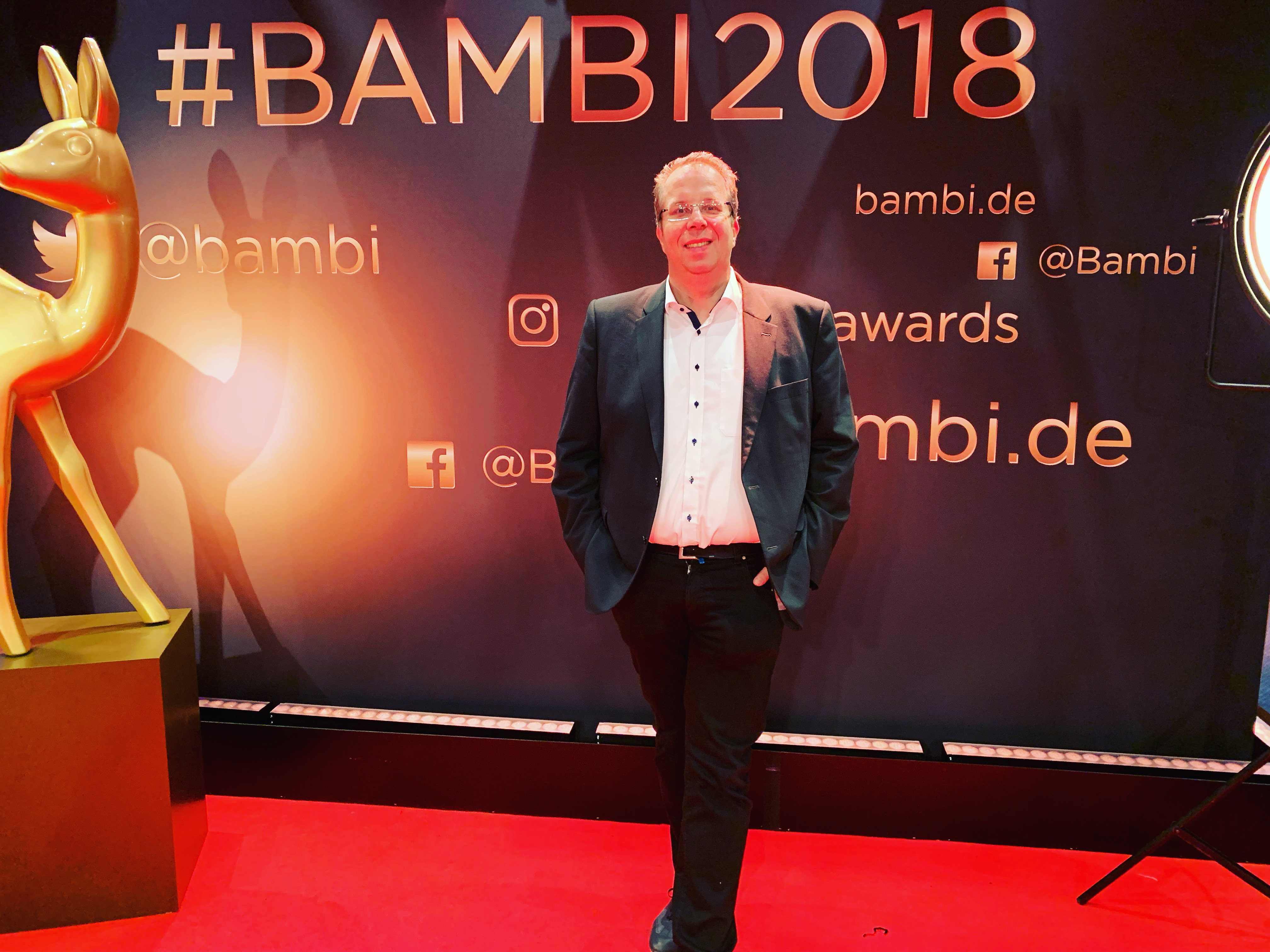 Danel Engelbarts bei der Bambi-Verleihung 2018